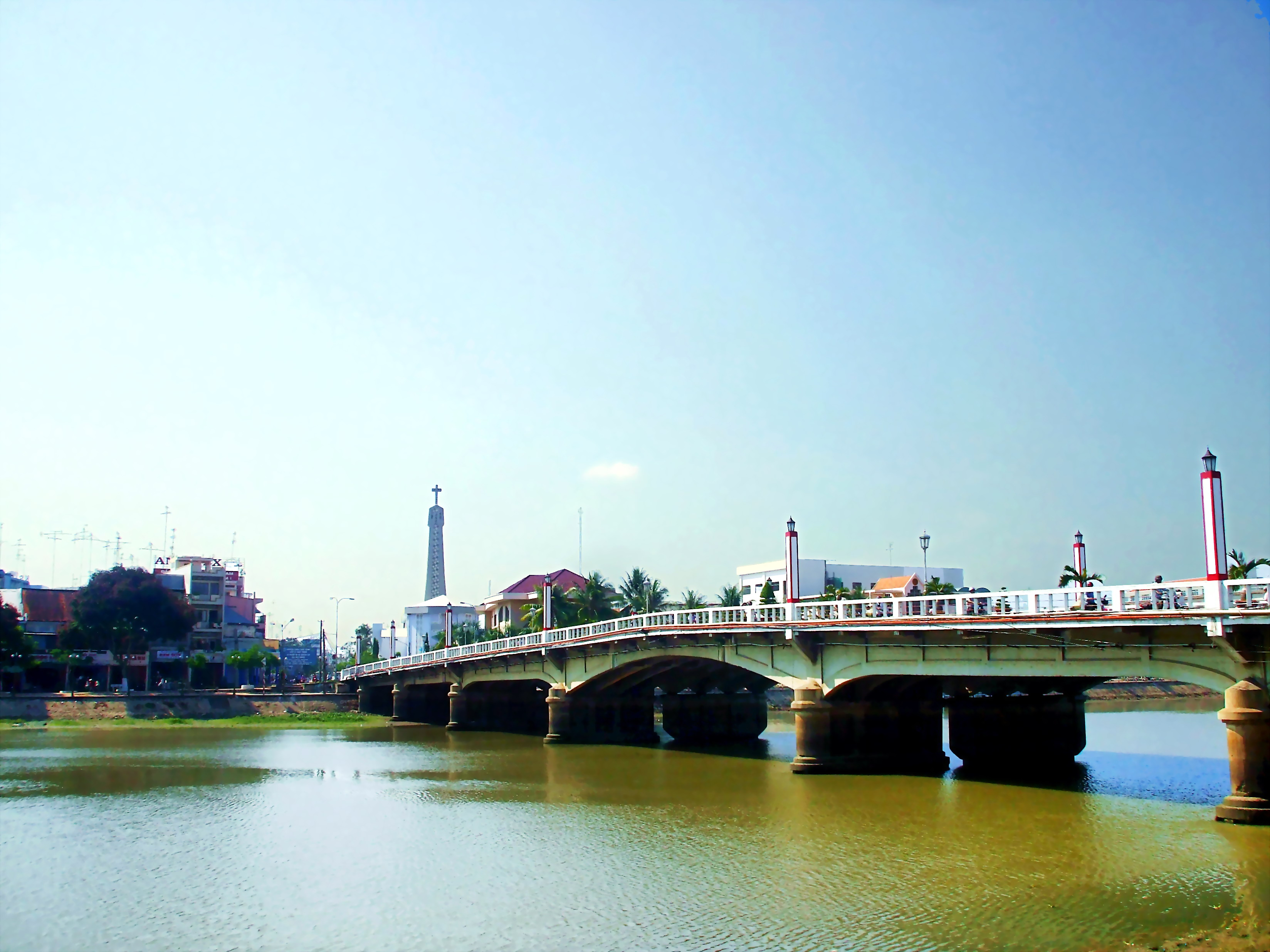 Cầu Hoàng Diệu bắc qua sông Long Xuyên, TP. Long Xuyên, tỉnh An Giang.